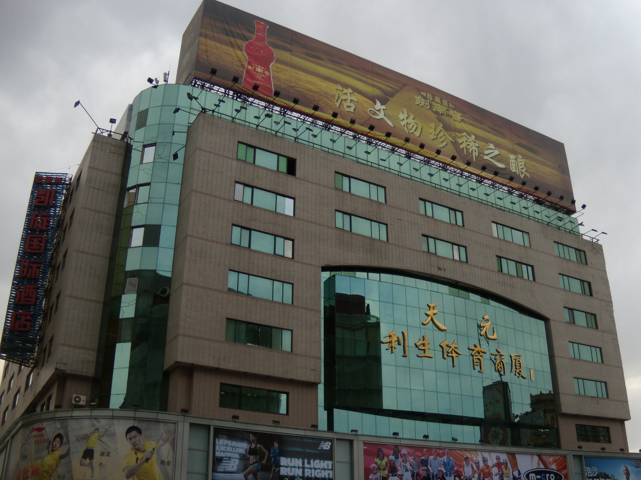 北京利生体育商厦，位于王府井大街